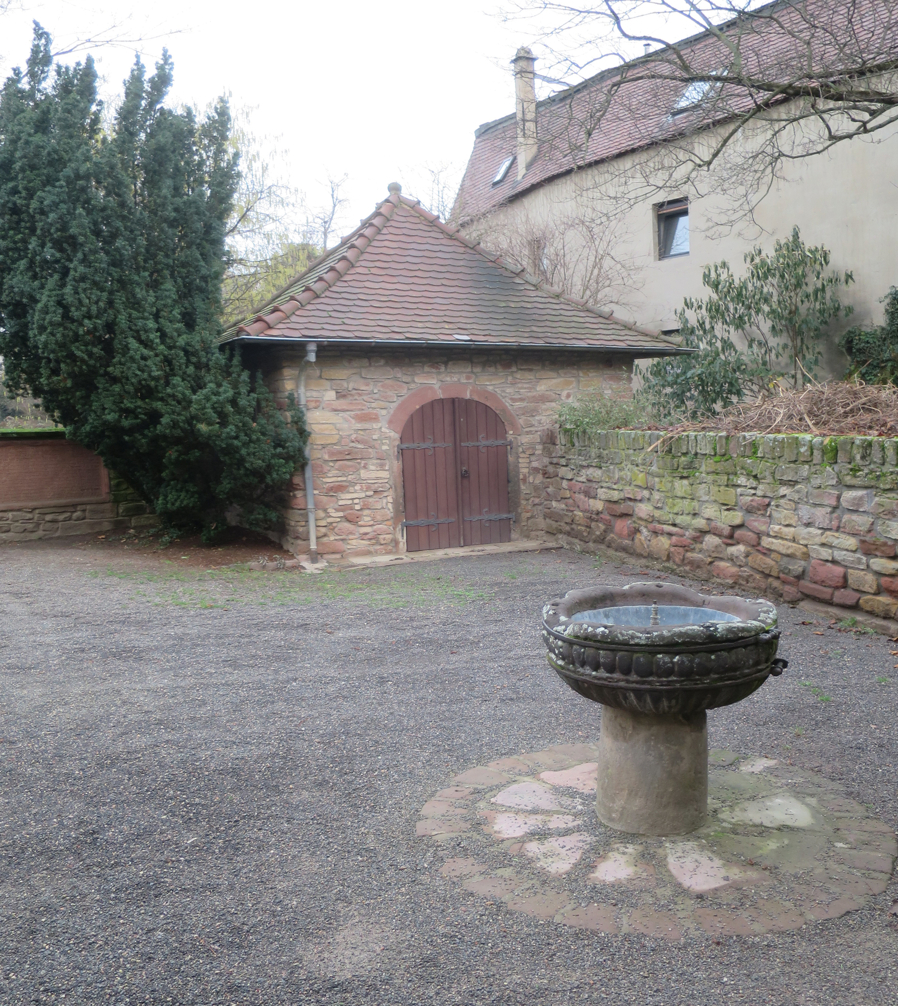 Leichenhalle und Handwaschbecken im Eingangsbereich des "Heiligen Sandes", Worms